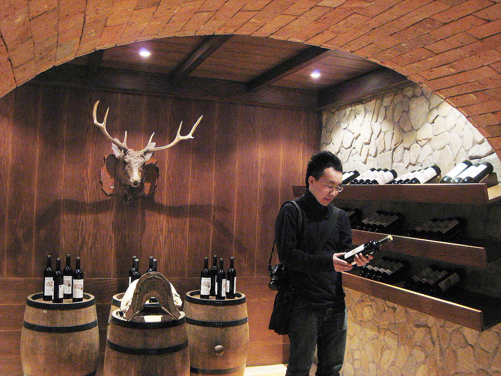 Vente de vins au détail à Shenzhen